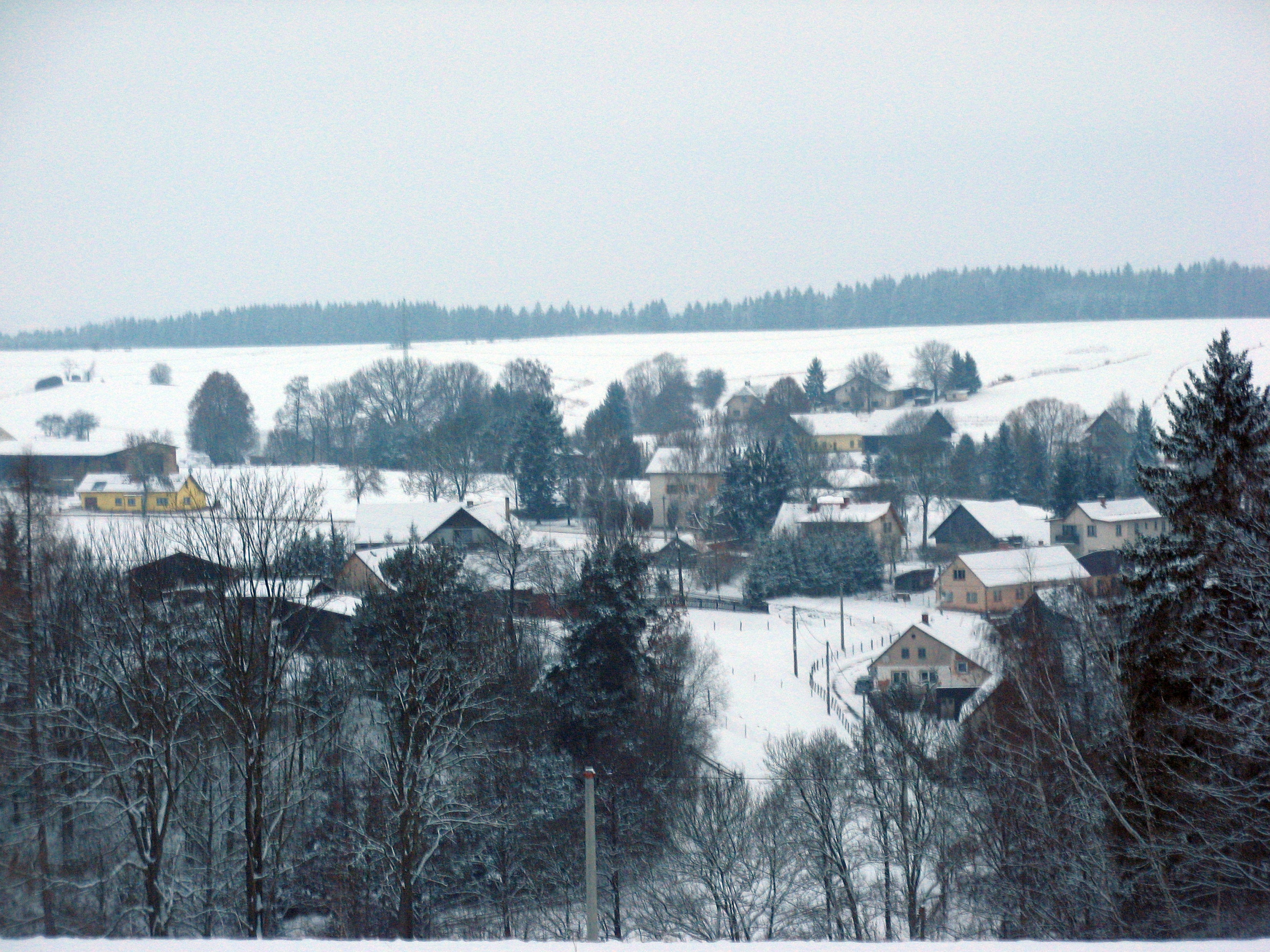 Fotografie vesnice Žďár u Staré Paky z kopce Hradiště.